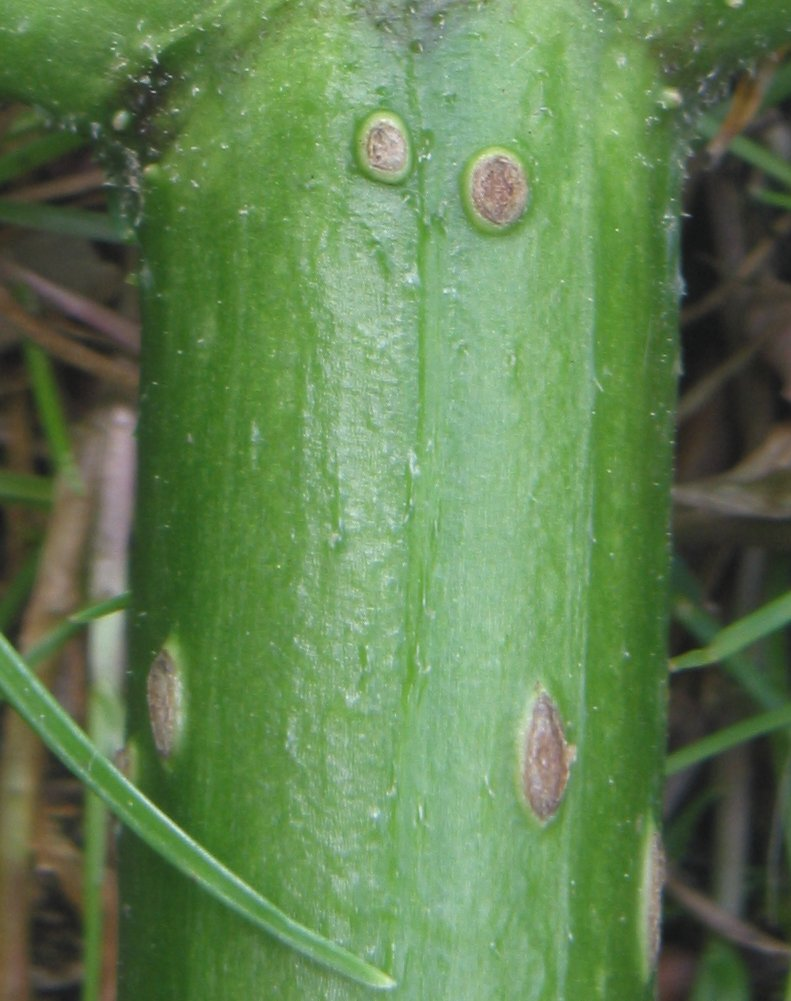 Lenticellen op vlier half juni.